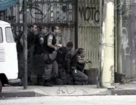 Operação de ocupação pela polícia da Vila Cruzeiro, na Penha, na zona norte do Rio, que era considerada uma fortaleza do tráfico. Reprodução de imagens da TV Brasil (ABr)